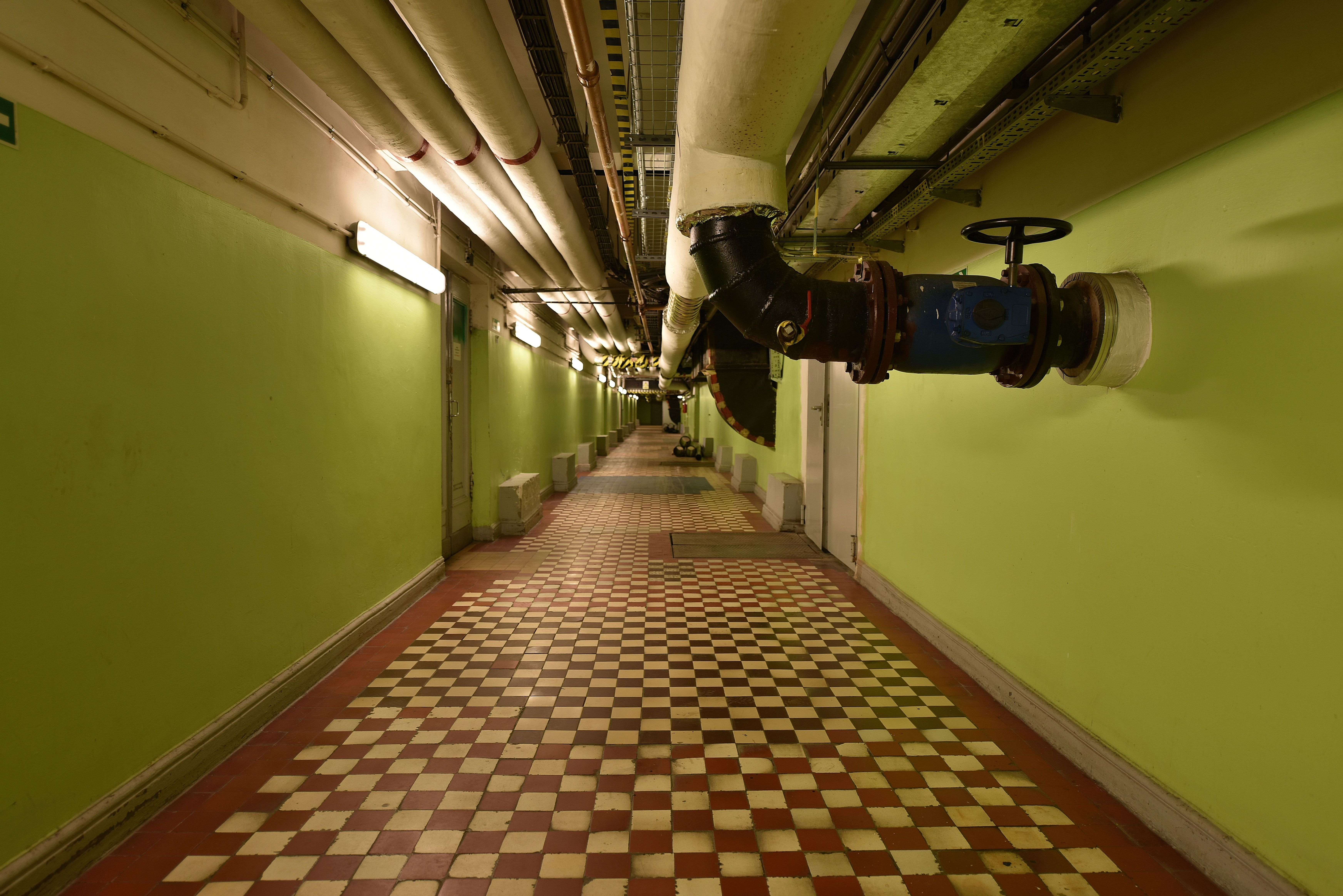 Korytarz na poziomie -1 w Pałacu Kultury i Nauki w Warszawie